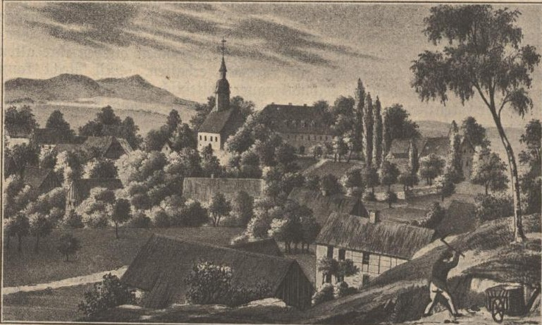 Beiträge zur Sächs. Volks- und Heimatkunde. Mit Zeichnungen von Professor O. Seyffert und Maler F. Rowland.